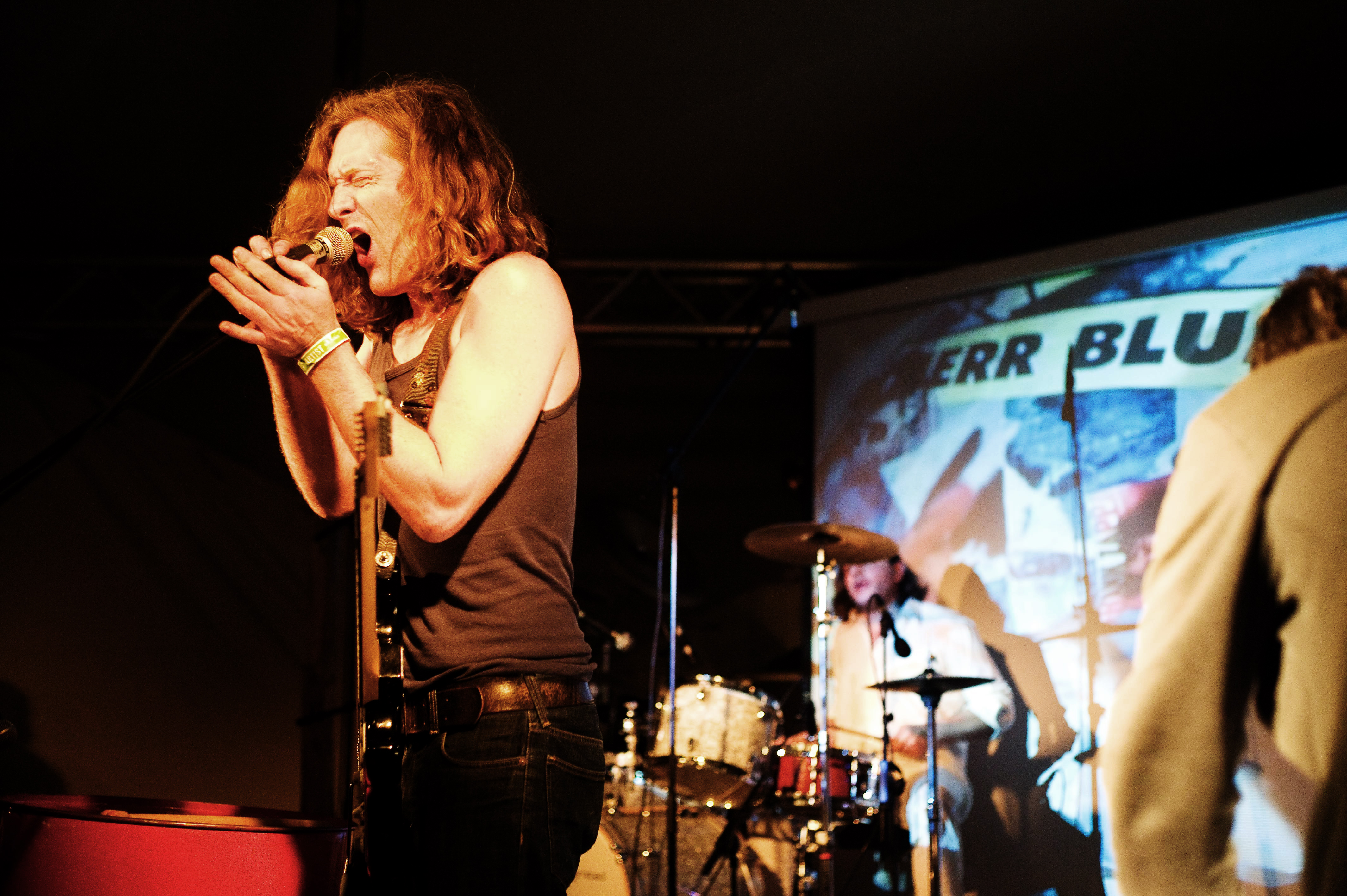 live, Zappanale